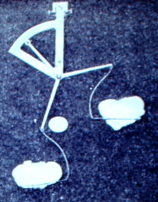 Pendelwaage für Kämmlinge